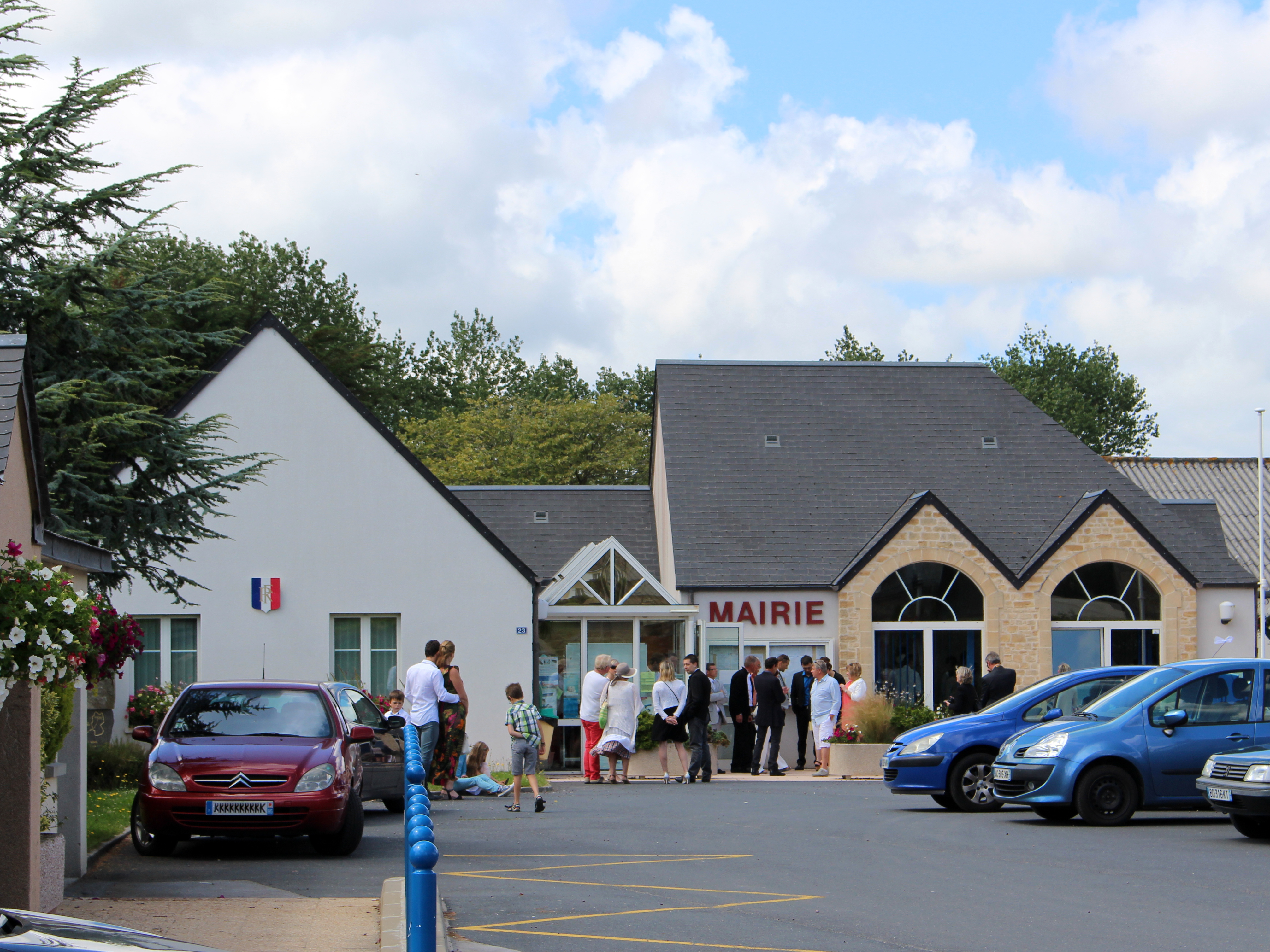 Quettetot, Manche